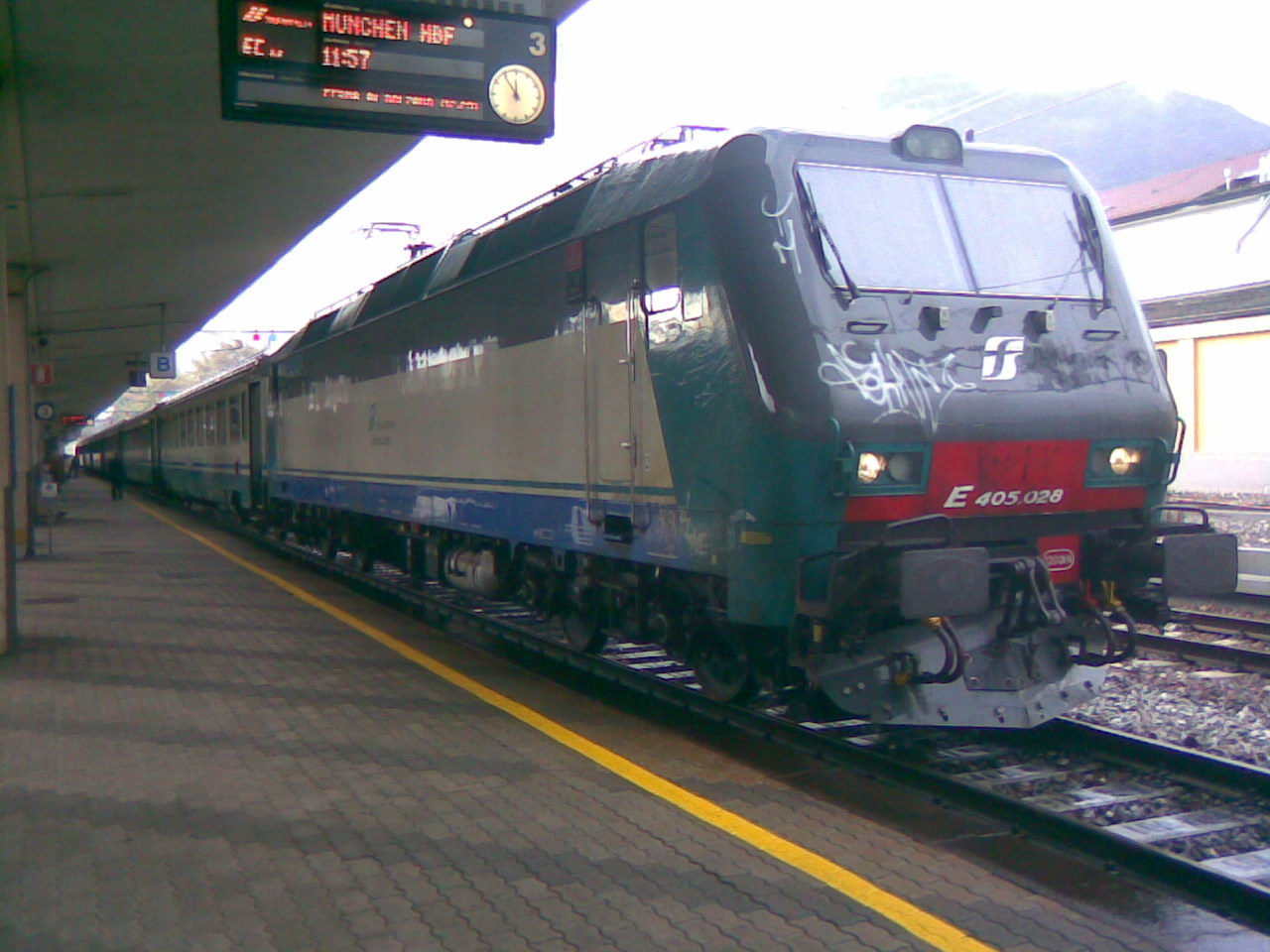 E.405 in transito presso la stazione di Trento in trazione ad un treno passeggeri Eurocity diretto a Monaco